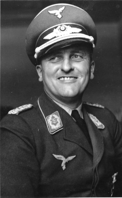 Zentralbild II. Weltkrieg 1939 - 1945 Oberst Günther Korten, der Generalstabschef der Luftflotte 4 die am Überfall der faschistischen Wehrmacht auf Polen beteiligt war. 13757-39